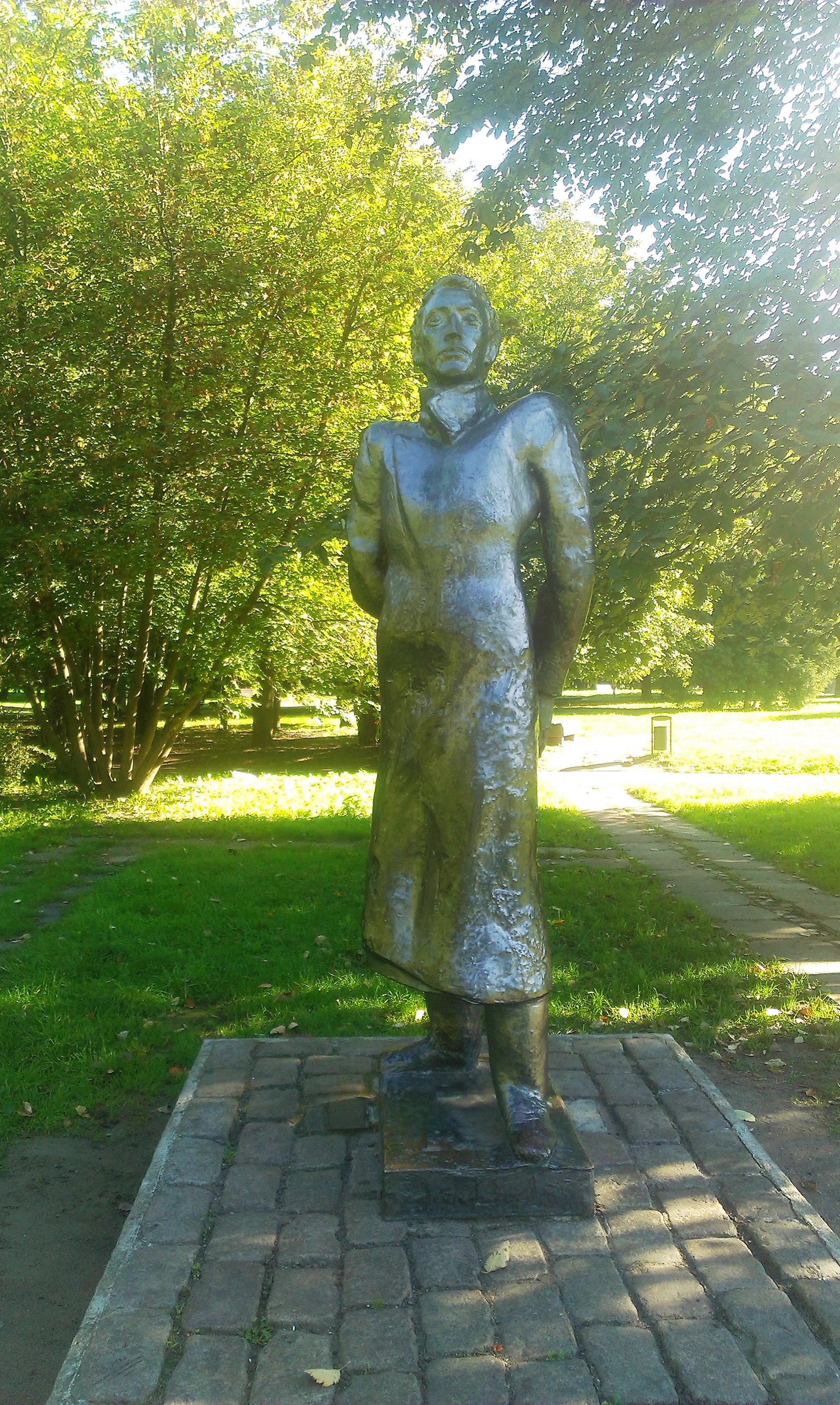 остров Канта